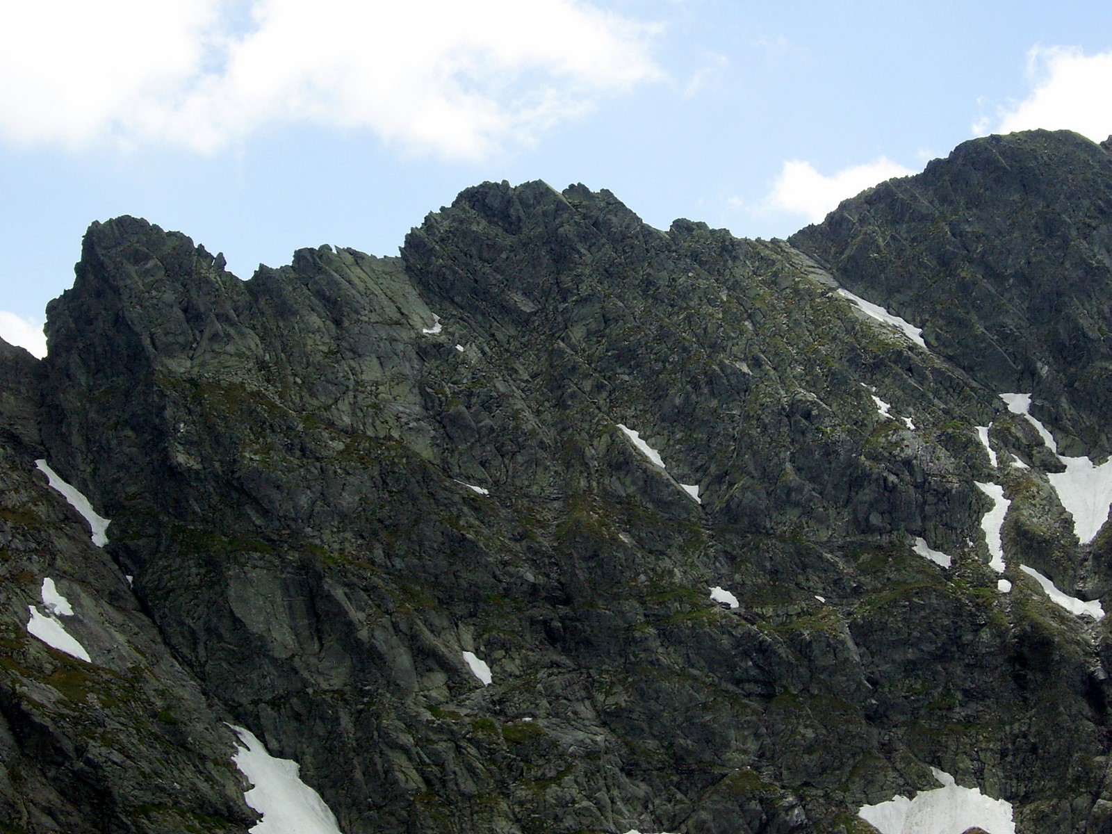 Niebieska i Gąsienicowa Turnia z Kościelca